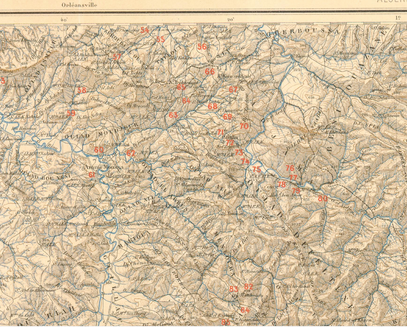 Carte archéologique de la région d'Ammi Mousse (Extrait de l'Atlas archéologique de l'Algérie de Stephane Gsell, paru en 1911) Les numéros en rouge correspondants aux ruines romaine, le château romain de Ksar el Koua est désigné sous le numéro : 63.